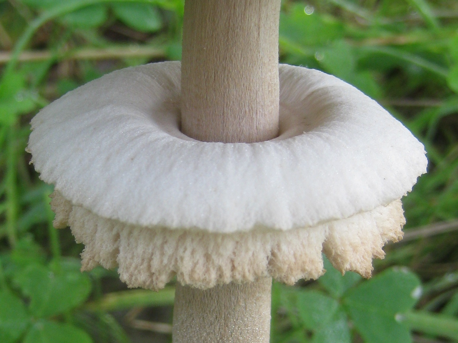 Macrolepiota procera (Scop.) Singer Place: Marteleira, Lourinhã, Portugal